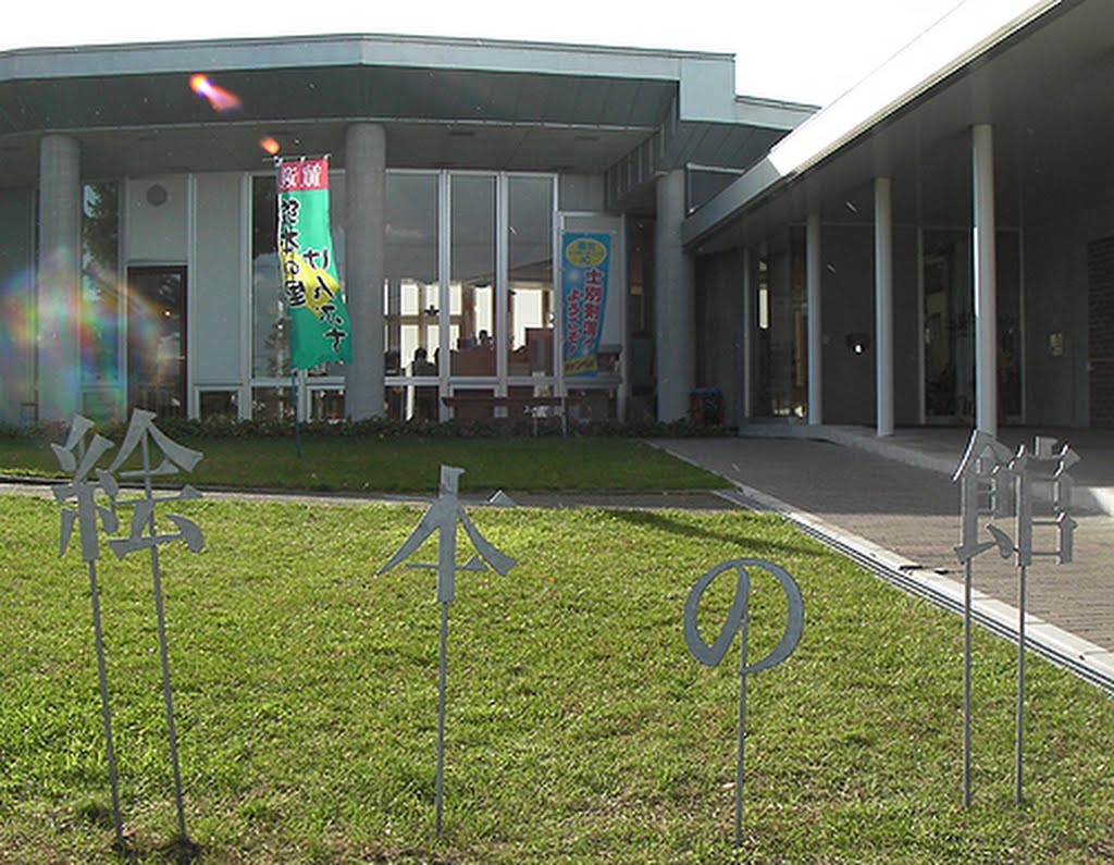 北海道剣淵町の剣淵町絵本の館。